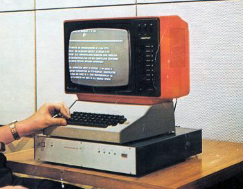 AC1 Heimcomputer